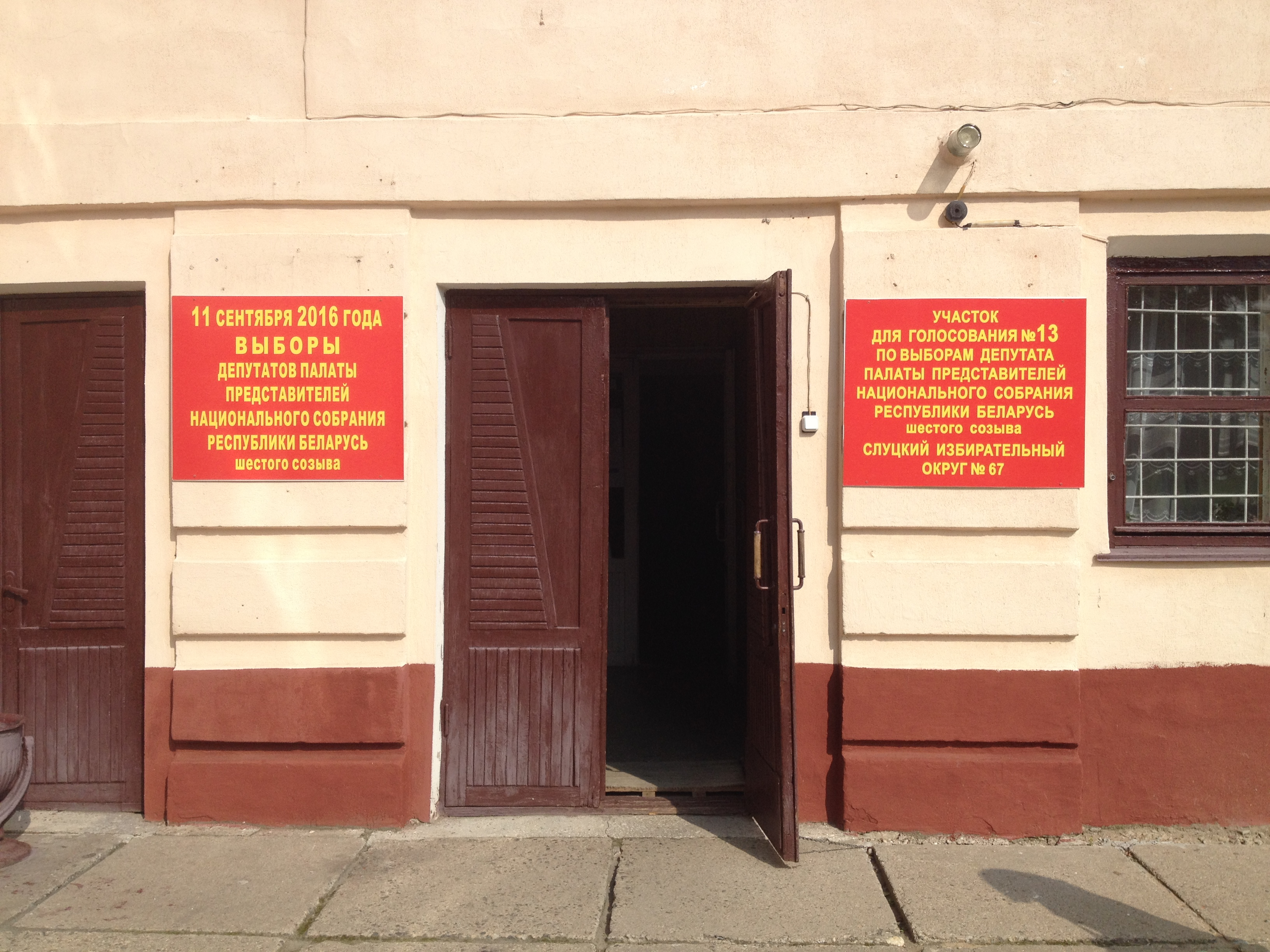 Wybory parlamentarne na Białorusi w 2016 roku.